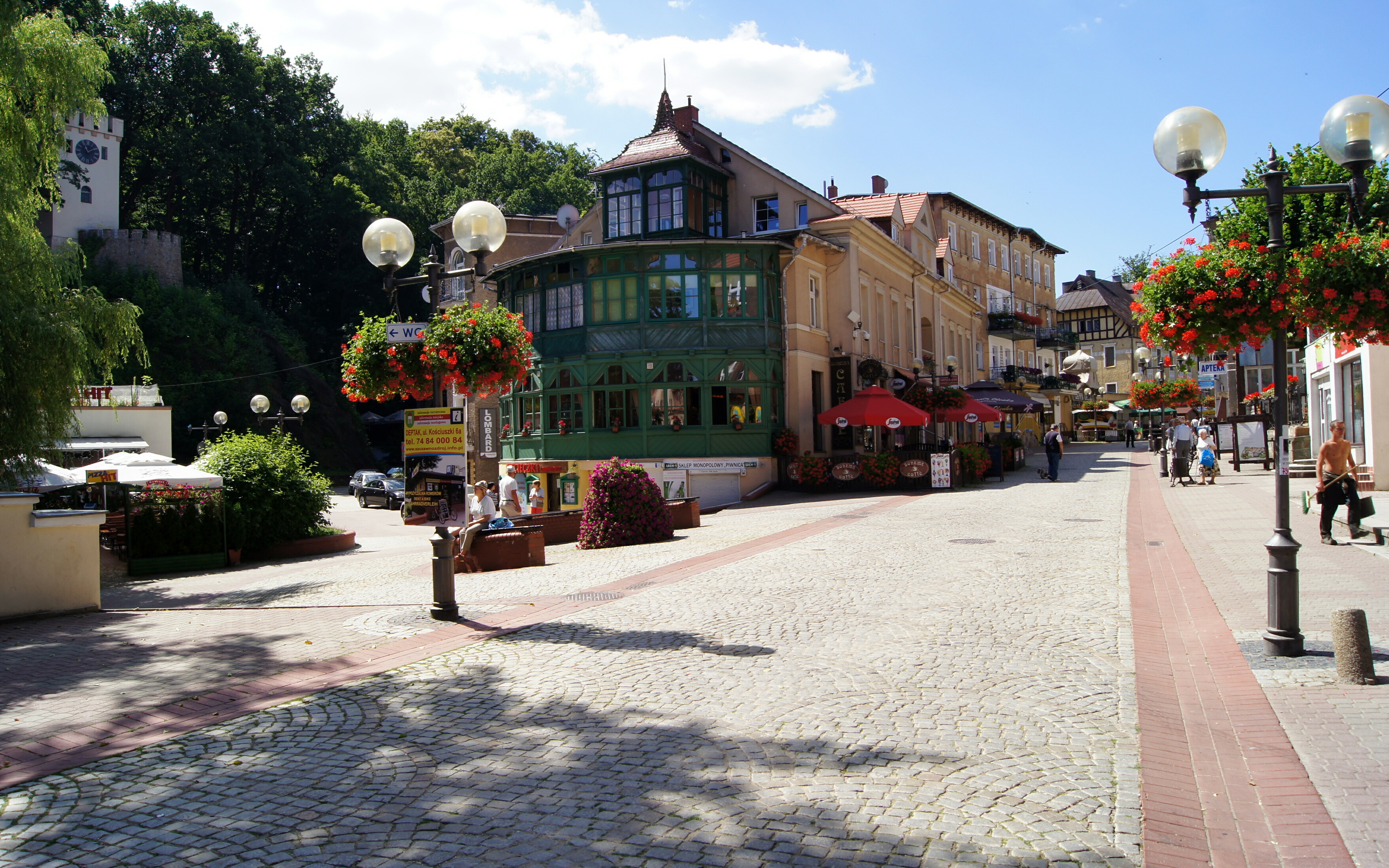 Szczawno-Zdrój, ul. Kościuszki 14